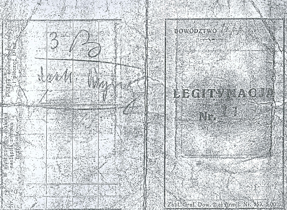 Legitymacja z 1920 str. 1